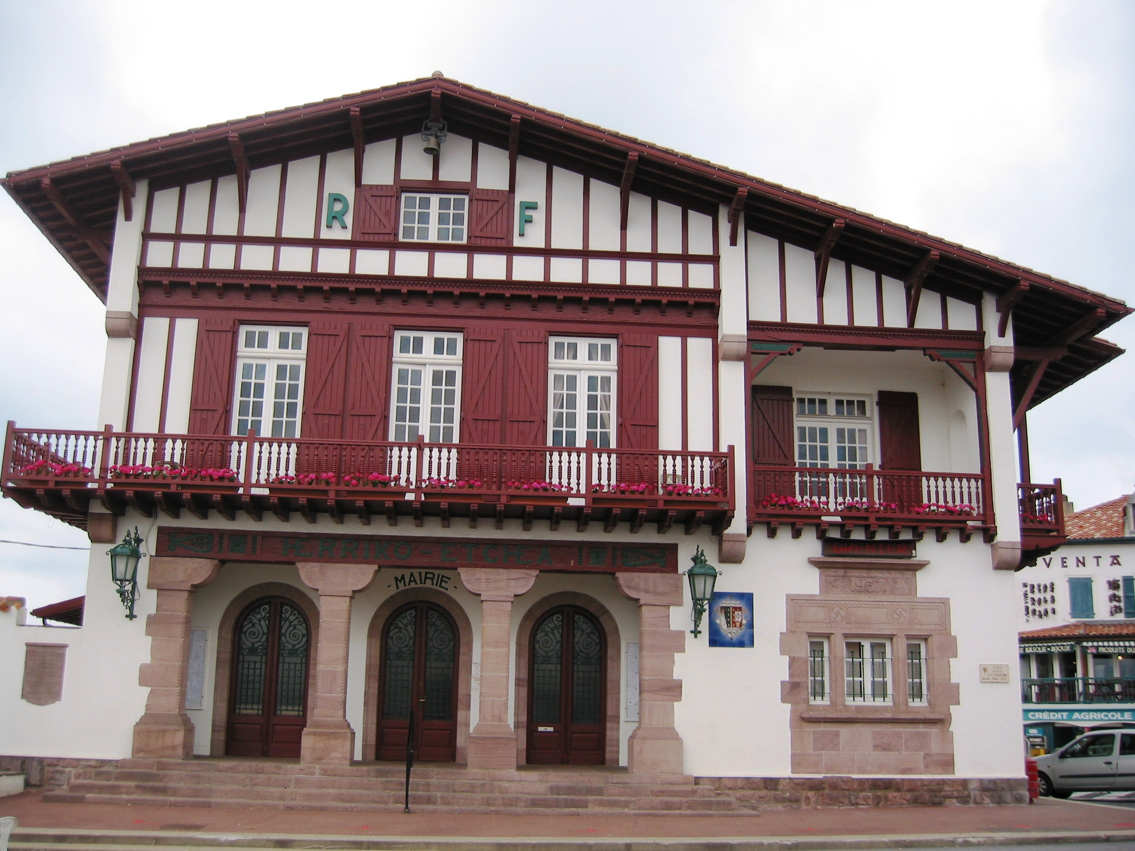 Bidart (France), l'hôtel de ville, Photo prise le 03/06/05 par Harrieta171